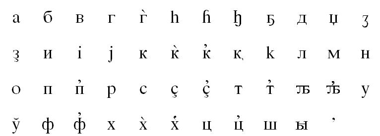 Kabarda alphabet (1906)